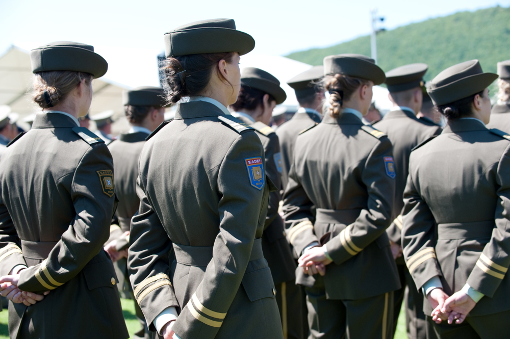 16. obljetnica vojnoredarstvene operacije Oluja u Kninu